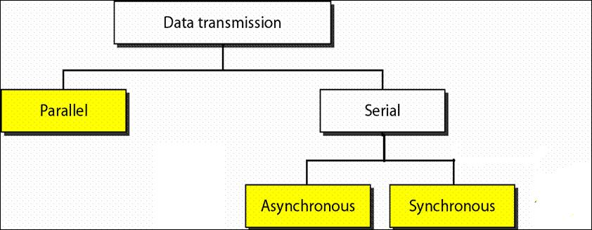 Data transmission prosessing